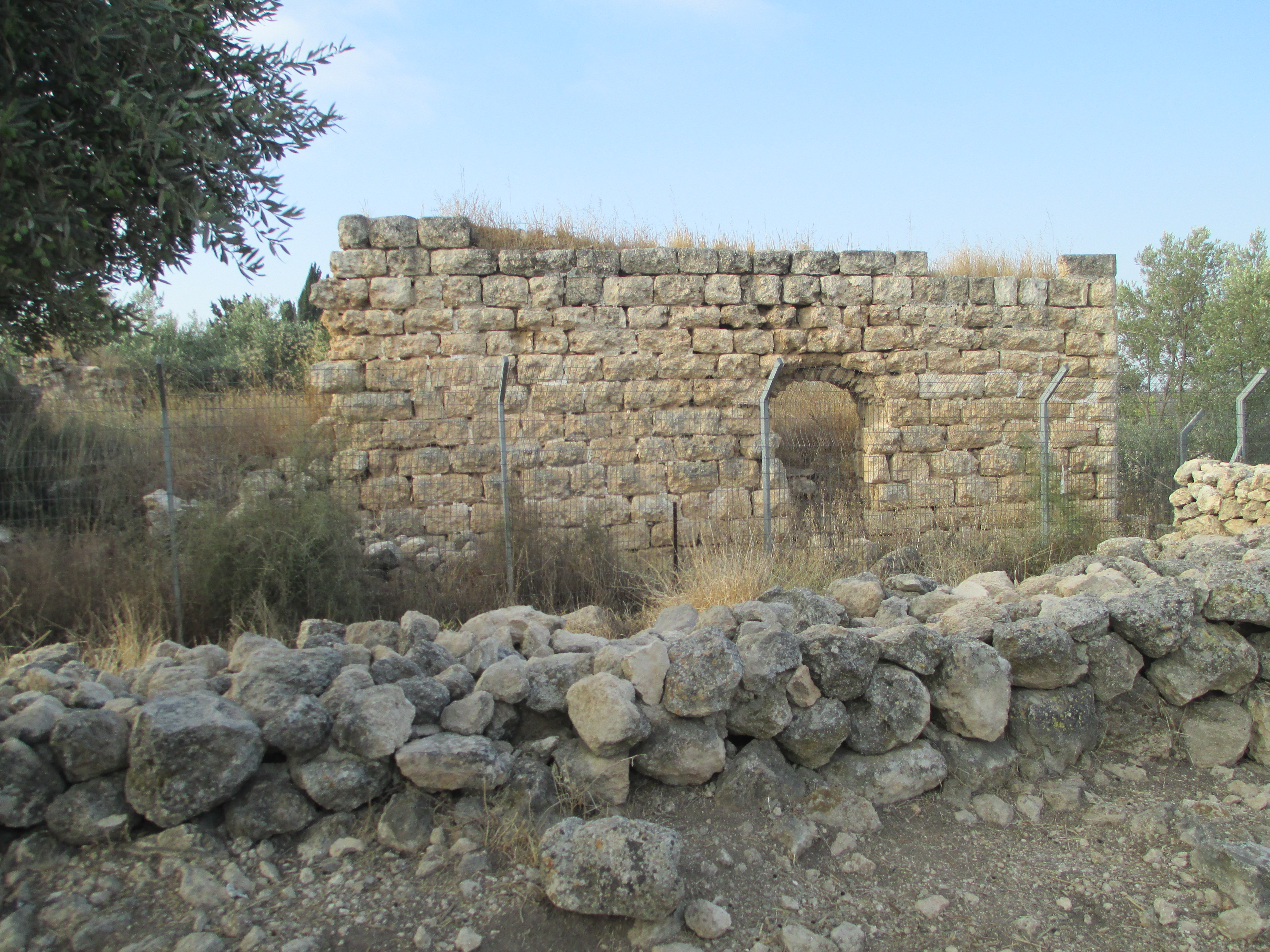 חירבת אום רוג'מן בגבעת הברושים במודיעין